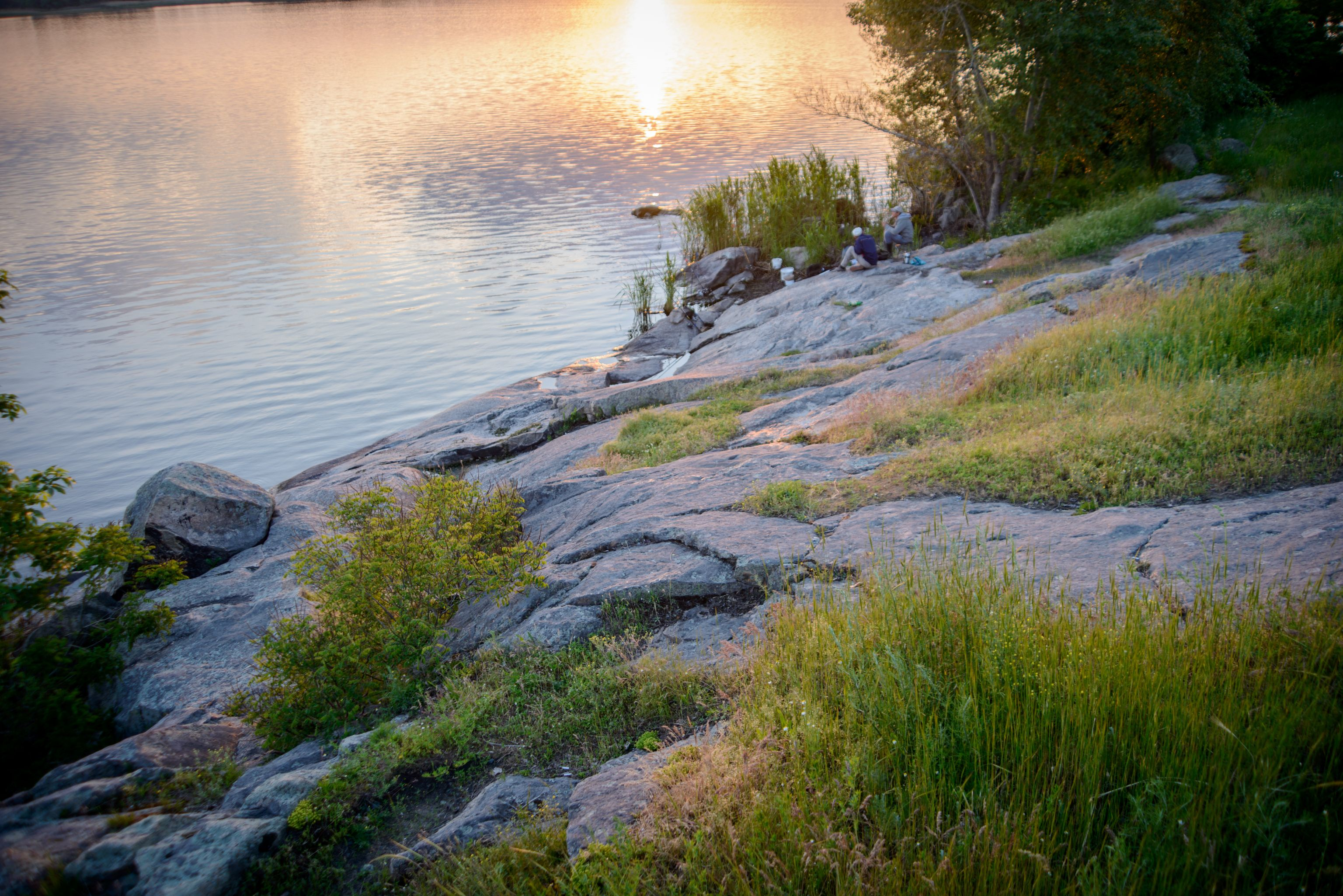 Келеберда, Кременчуцький р-н, с. Келеберда, лівий берег Дніпра